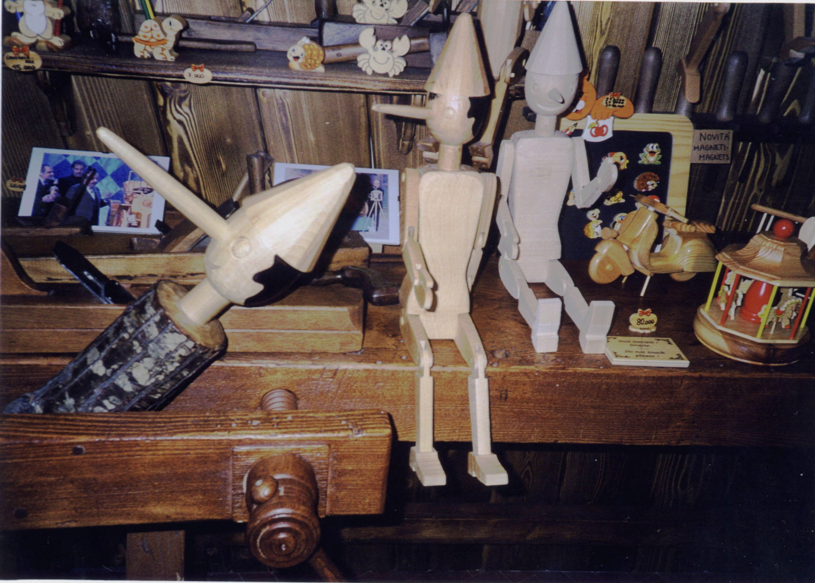 Burattini (Pinocchio) in costruzione in un negozio di Firenze (Italia)